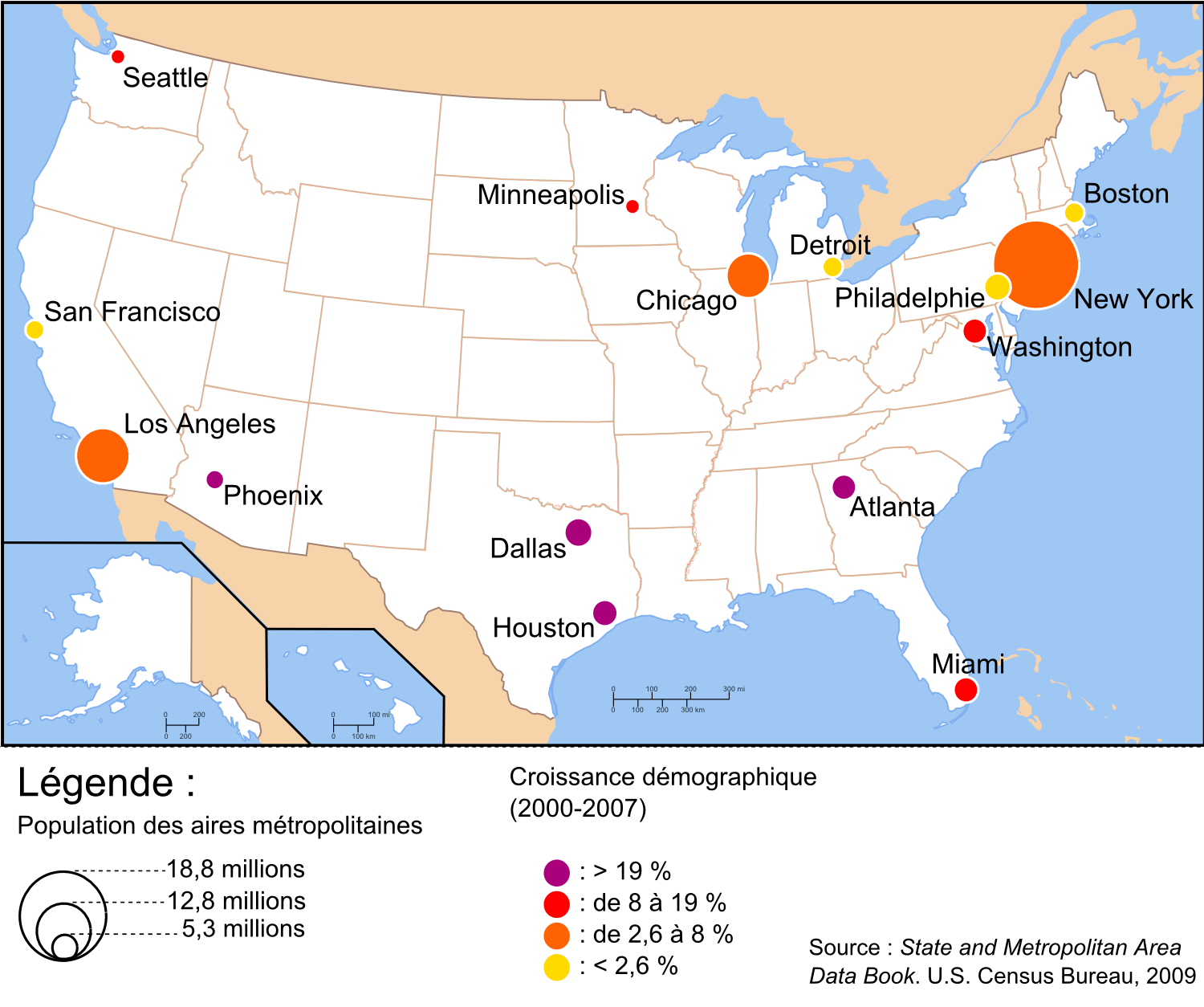 Carte des principales aires urbaines aux Etats-Unis